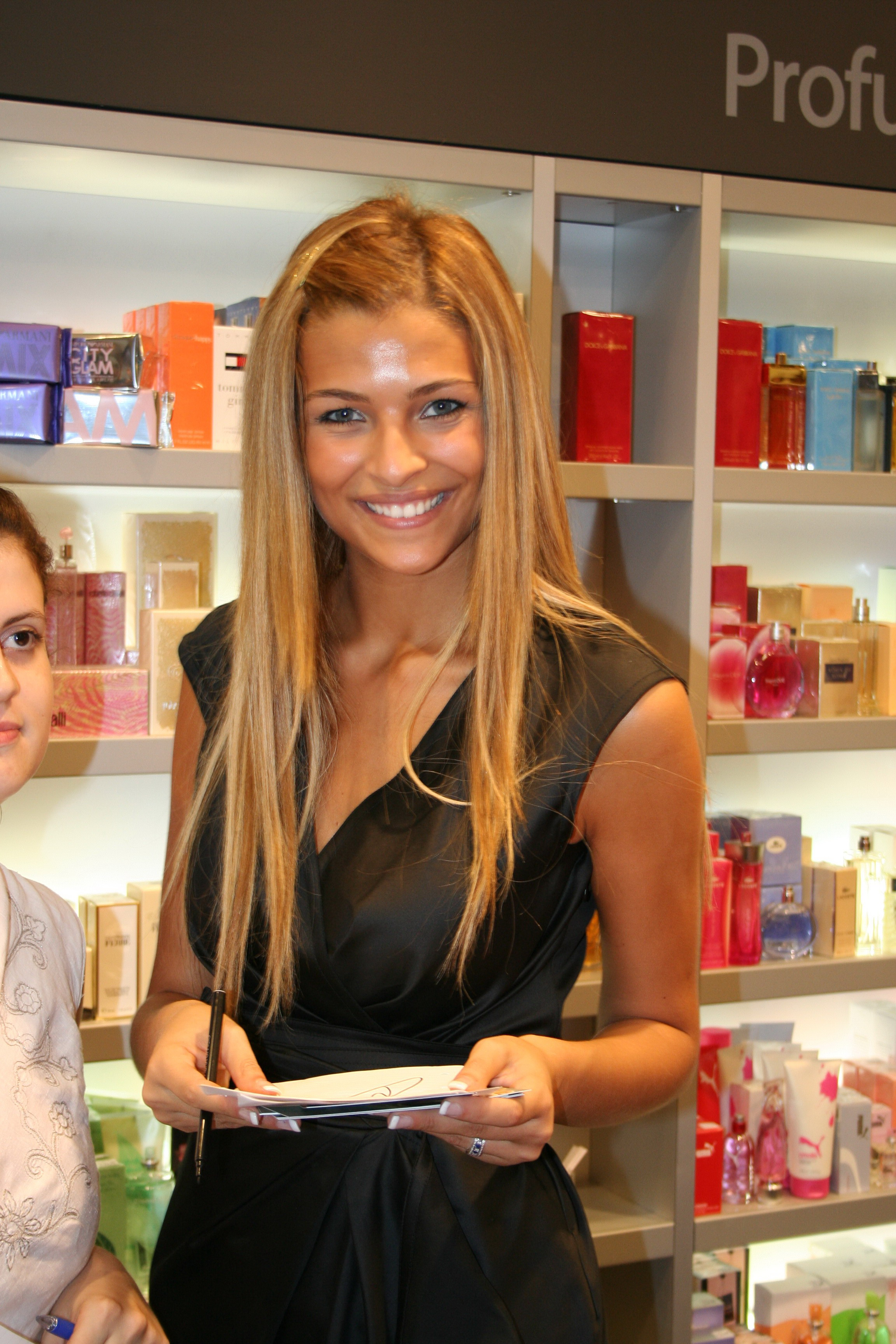 Cristina Chiabotto (Miss Italy) ad una inaugurazione a Ferrara (Italia)